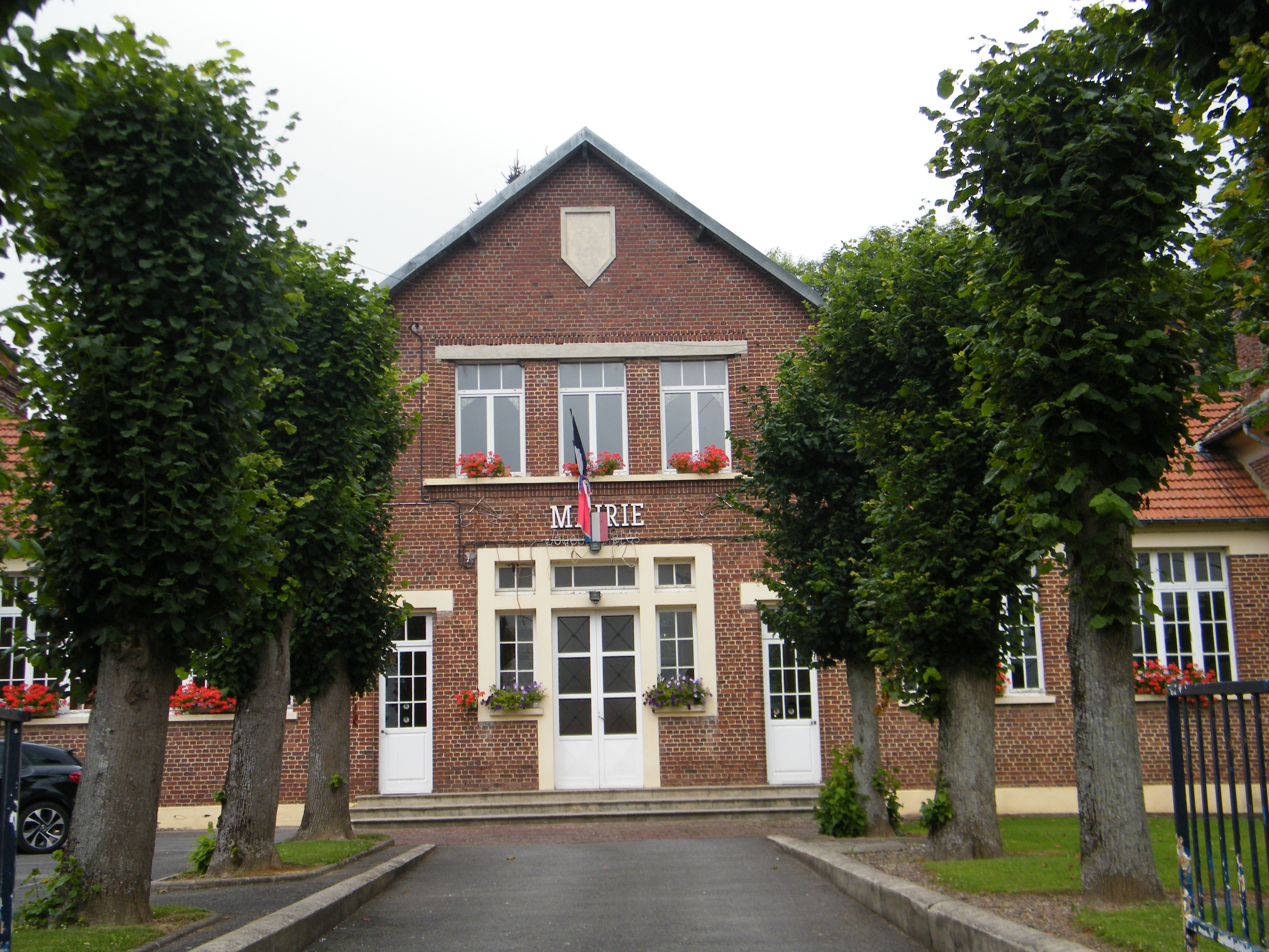 Mairie.